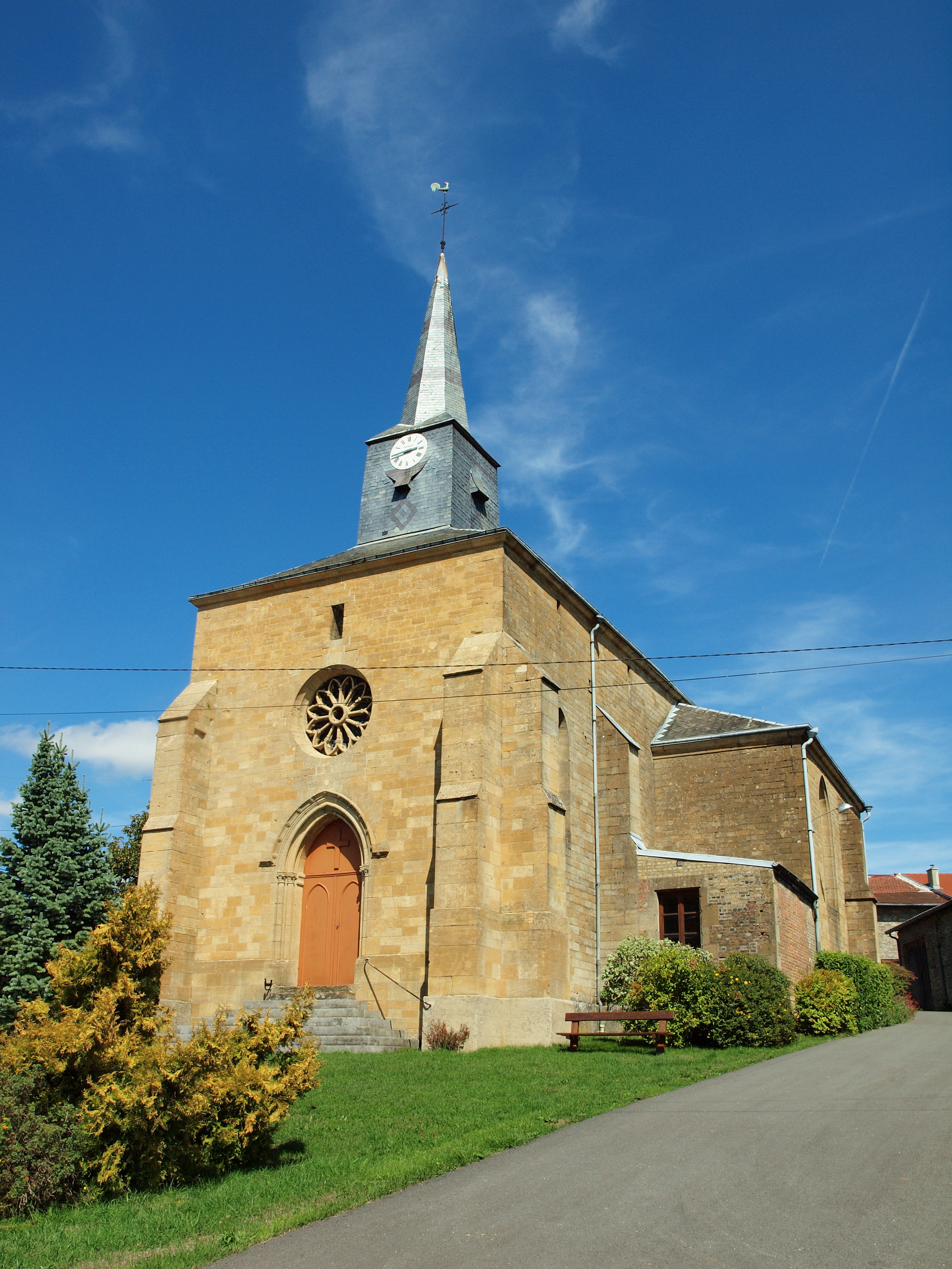 Bar-lès-Buzancy (Ardennes, France)